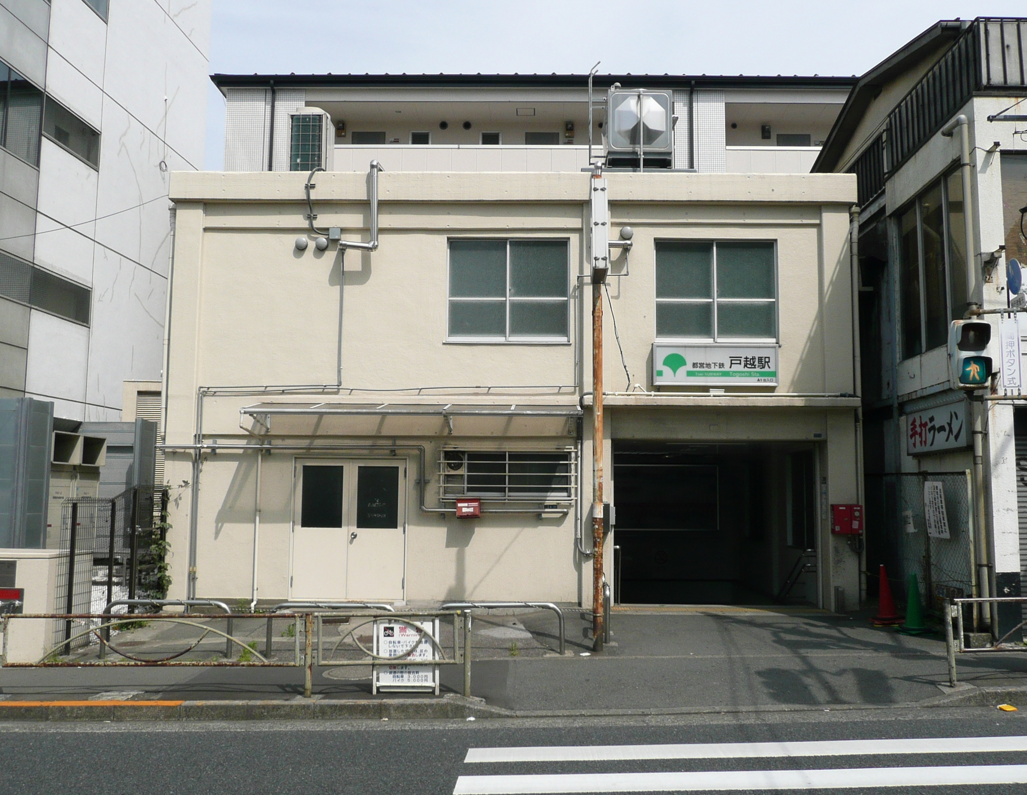 戸越駅A1出入口